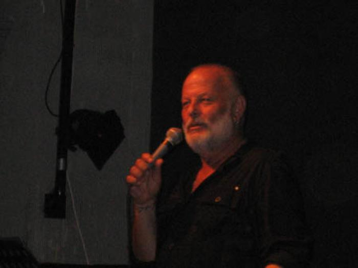 אריק סיני שר משירי ליאונרד כהן First we take Manhattan